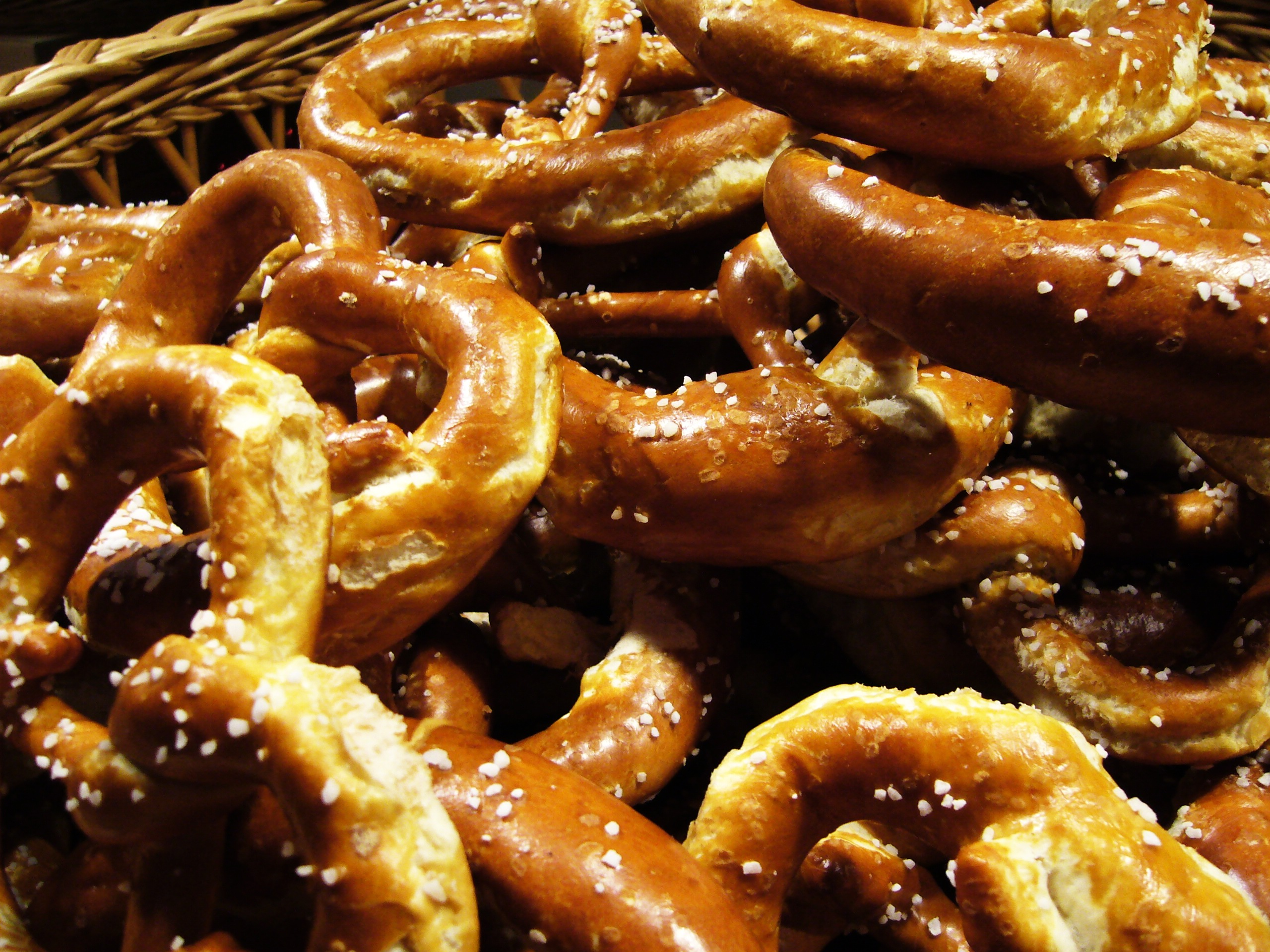 Bretzels du marché de Noël